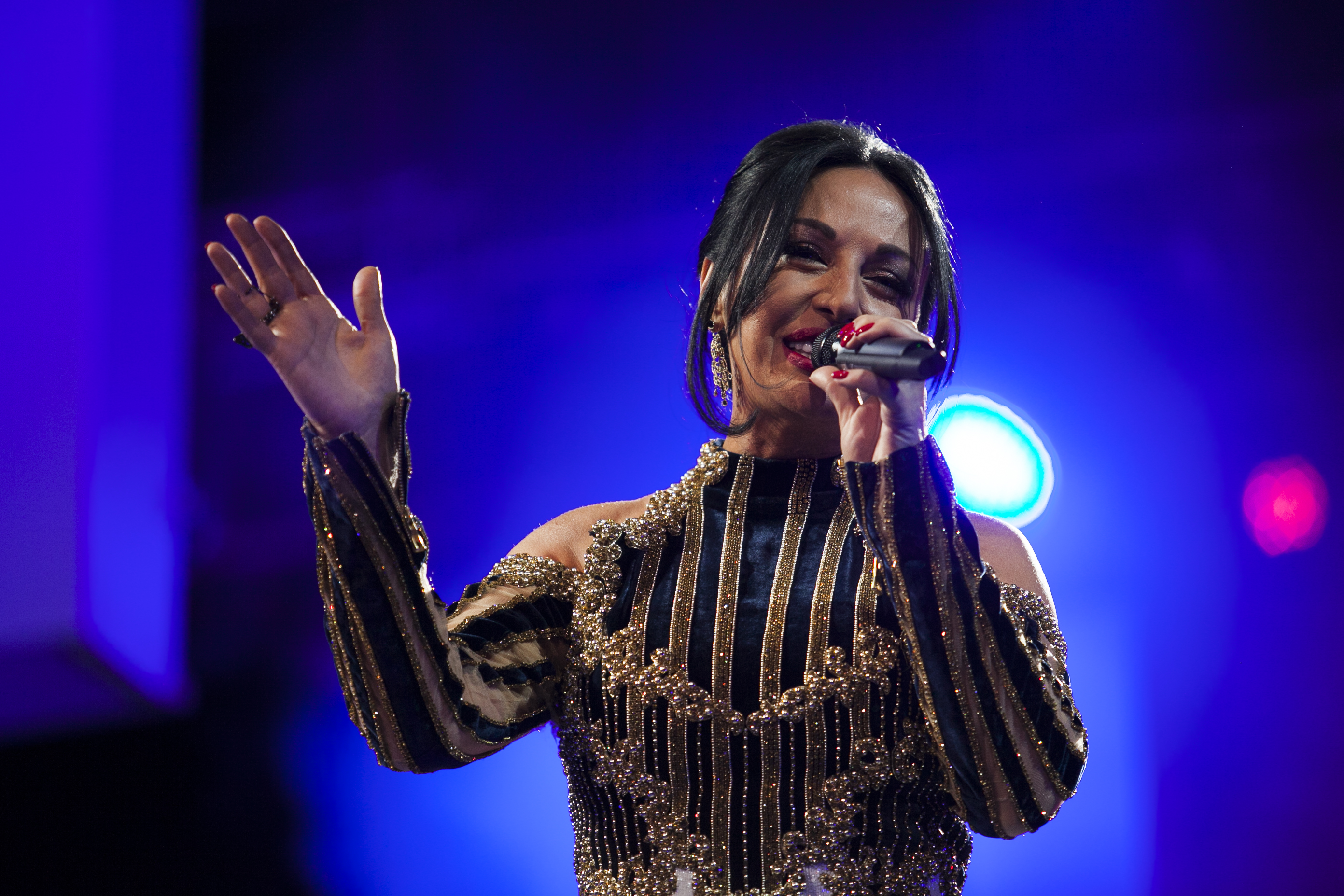 გადაღებულია თბილისის ფილარმონიის საკონცერტო დარბაზში. 20 მაისი, 2018 წელი